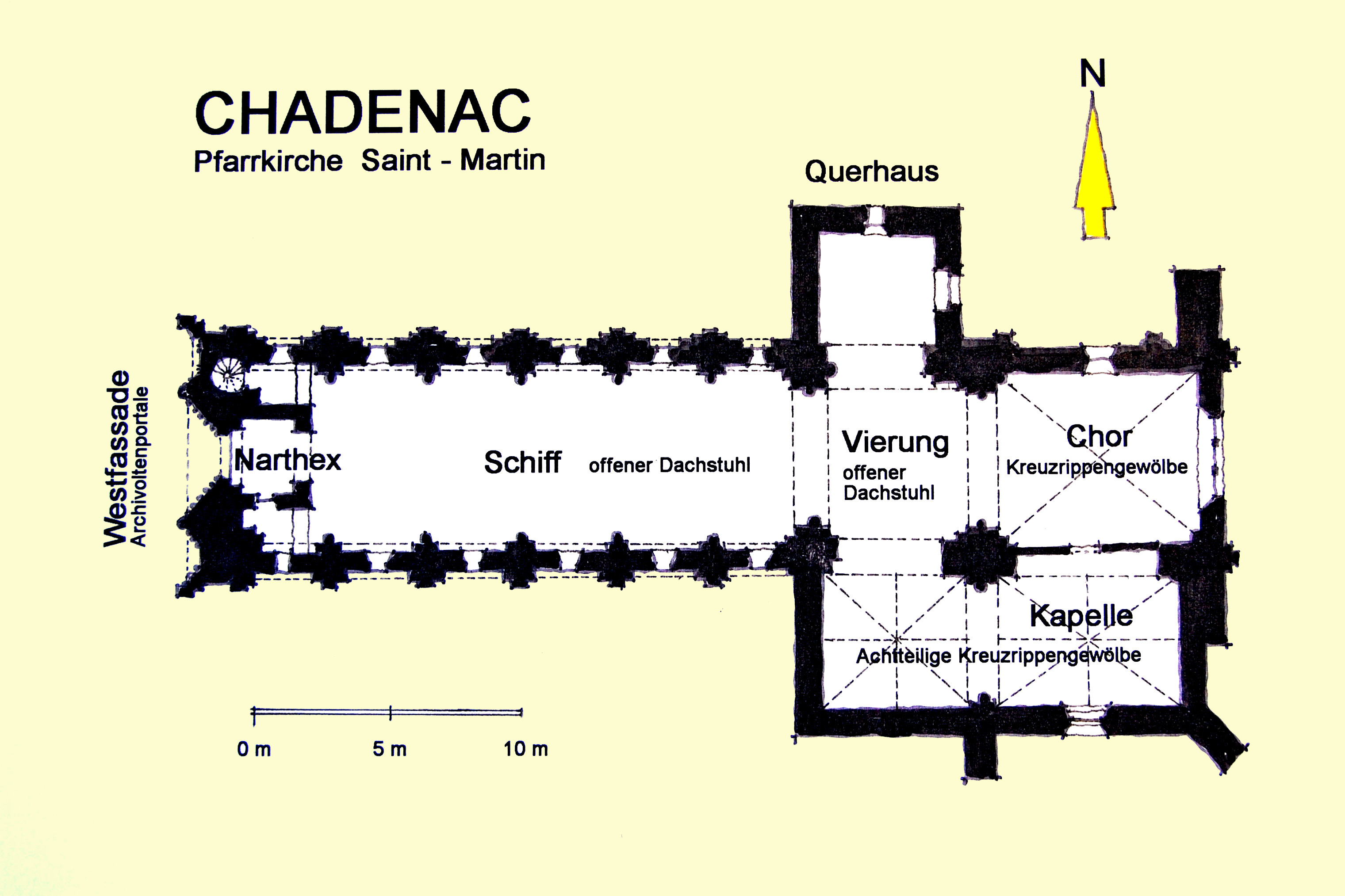 Chadenac, Grundriss, handskizze